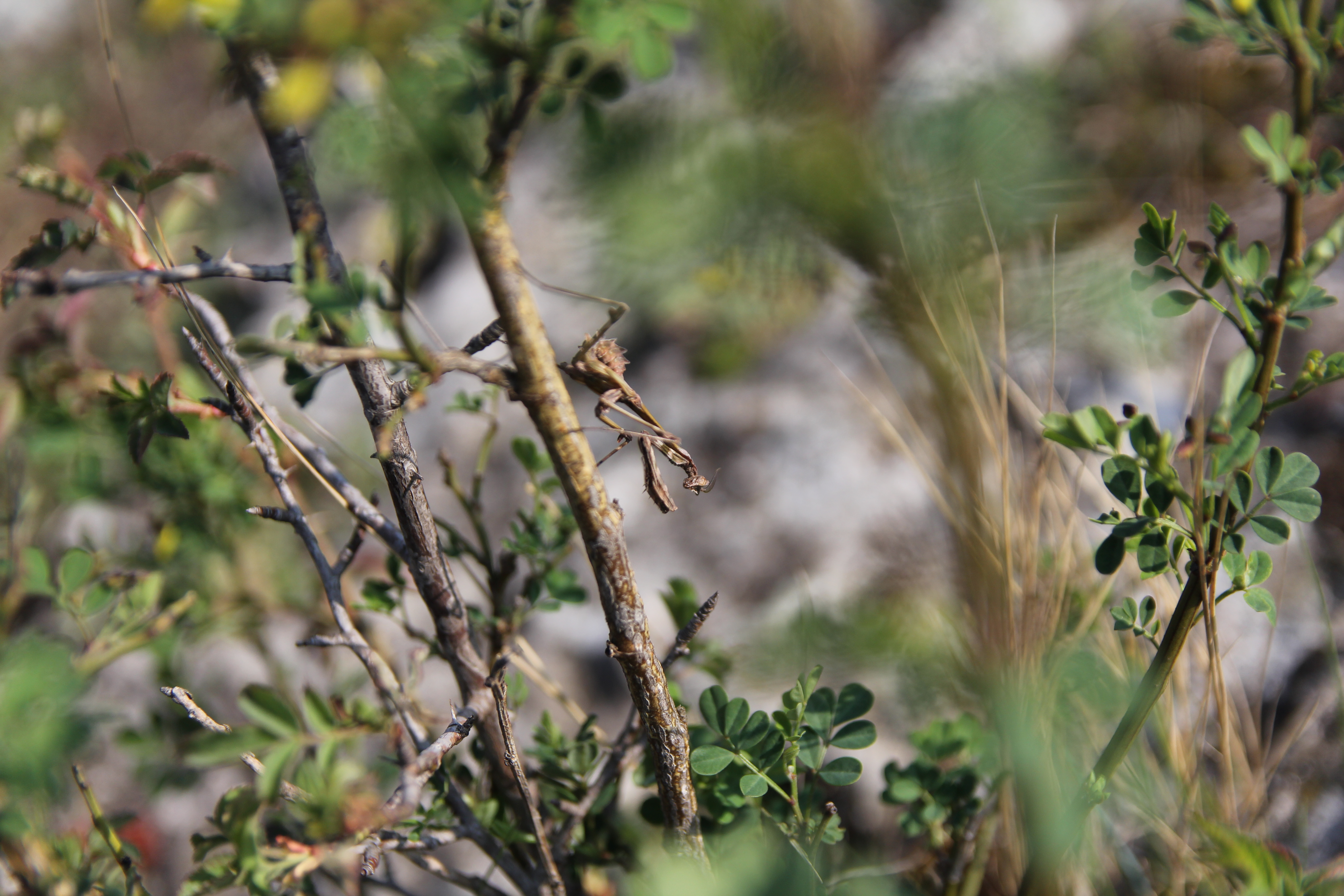 Srpski (latinica): Empusa fasciata, Jelašnička klisura, Srbija